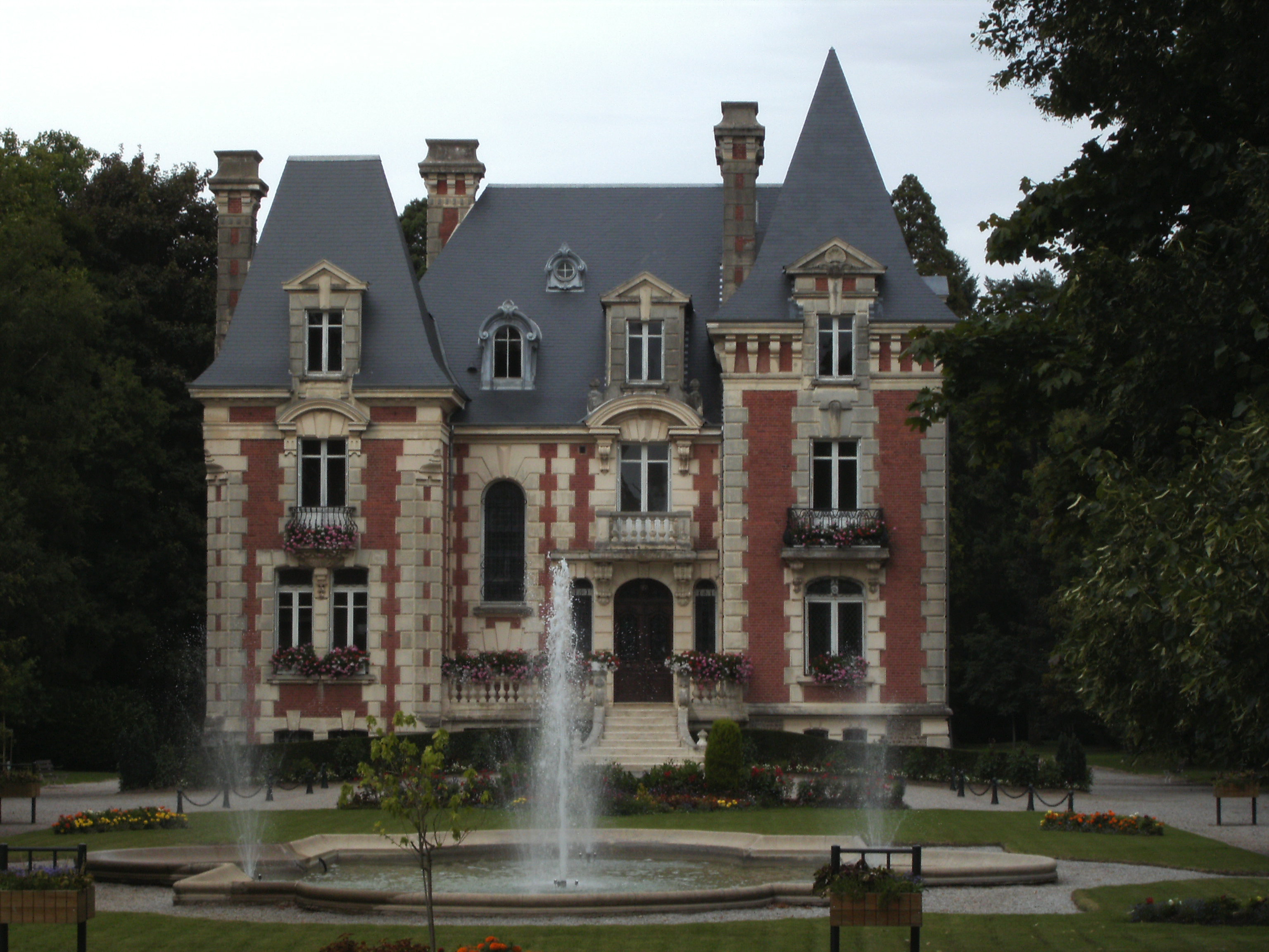 Livarot (Calvados-France) - Manoir de l'Isle